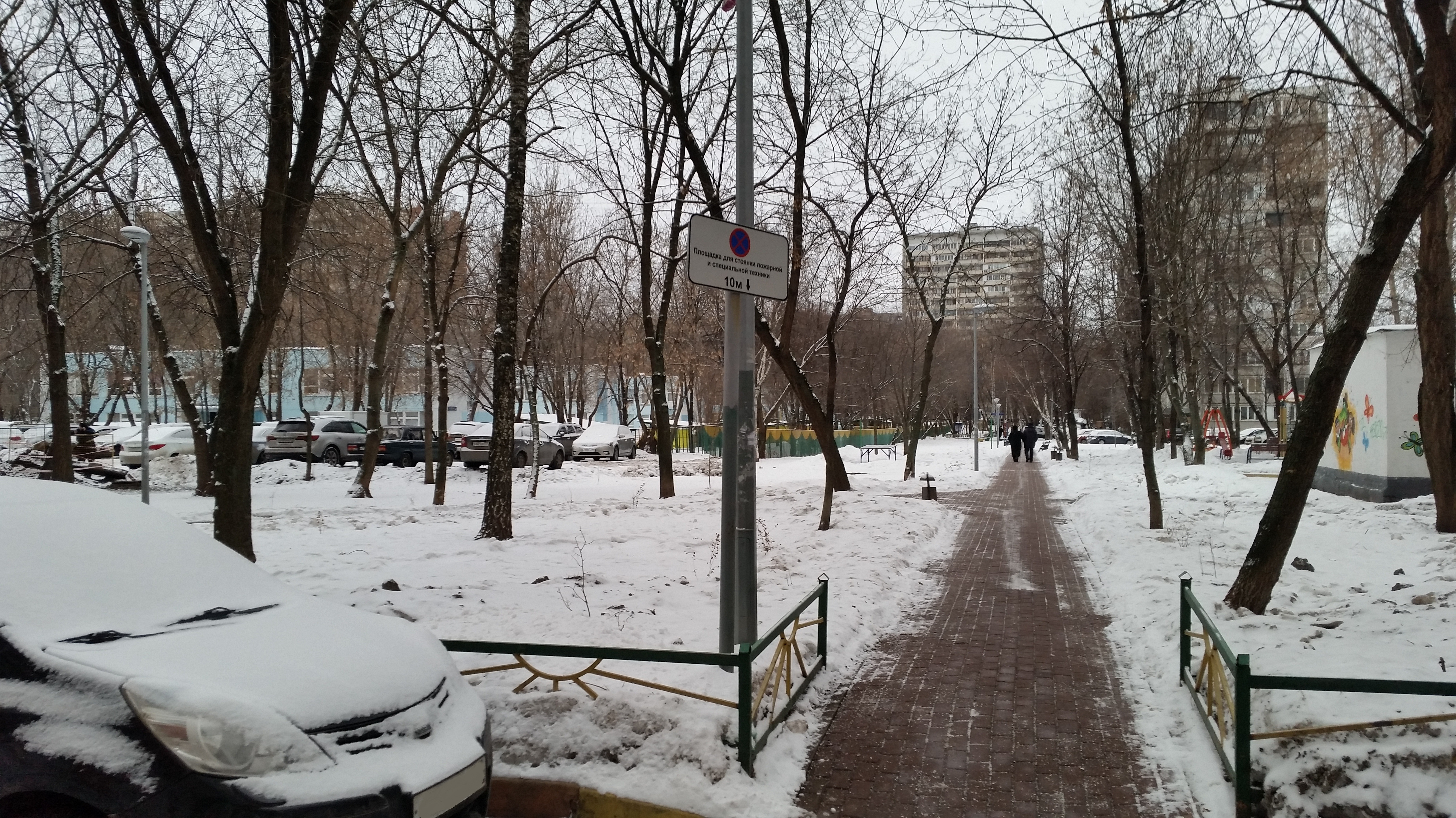 Место съёмок фильма "Вам и не снилось..." 1980 года. ул., Енисейская дом 21.